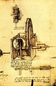 рисунок Леонардо да Винчи - Пластинчатый шпиндель